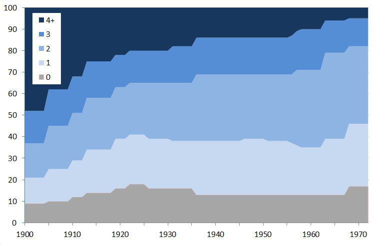 Lebendgeburten pro Ehe nach Jahr der Eheschliessung, Deutschland (BRD), 1900-1972; Datenquelle: Bernd Camphausen: Auswirkungen demographischer Prozesse au f die Berufe und die Kosten im Gesundheitswesen, Springer, 1983, S. 30